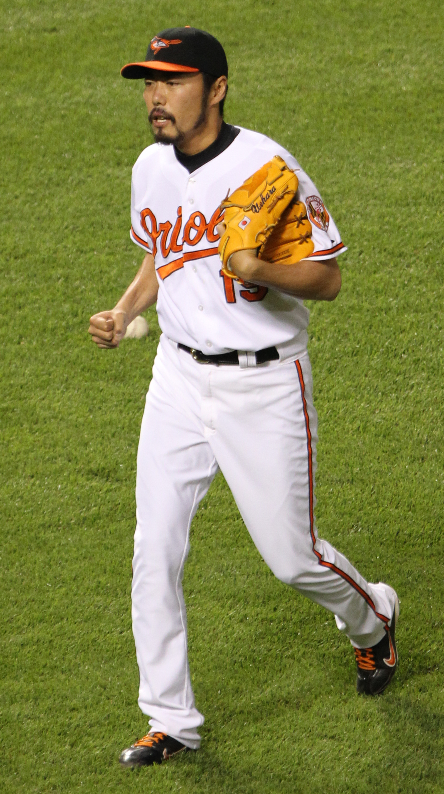 Koji Uehara